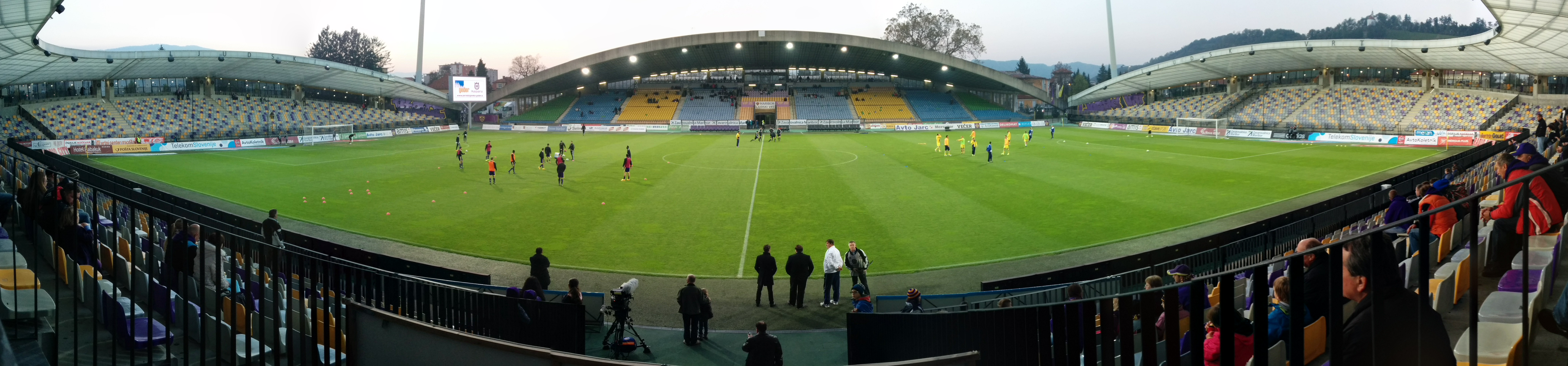 Ljudski vrt